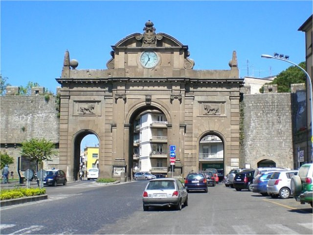 Viterbo, Porta Fiorentina